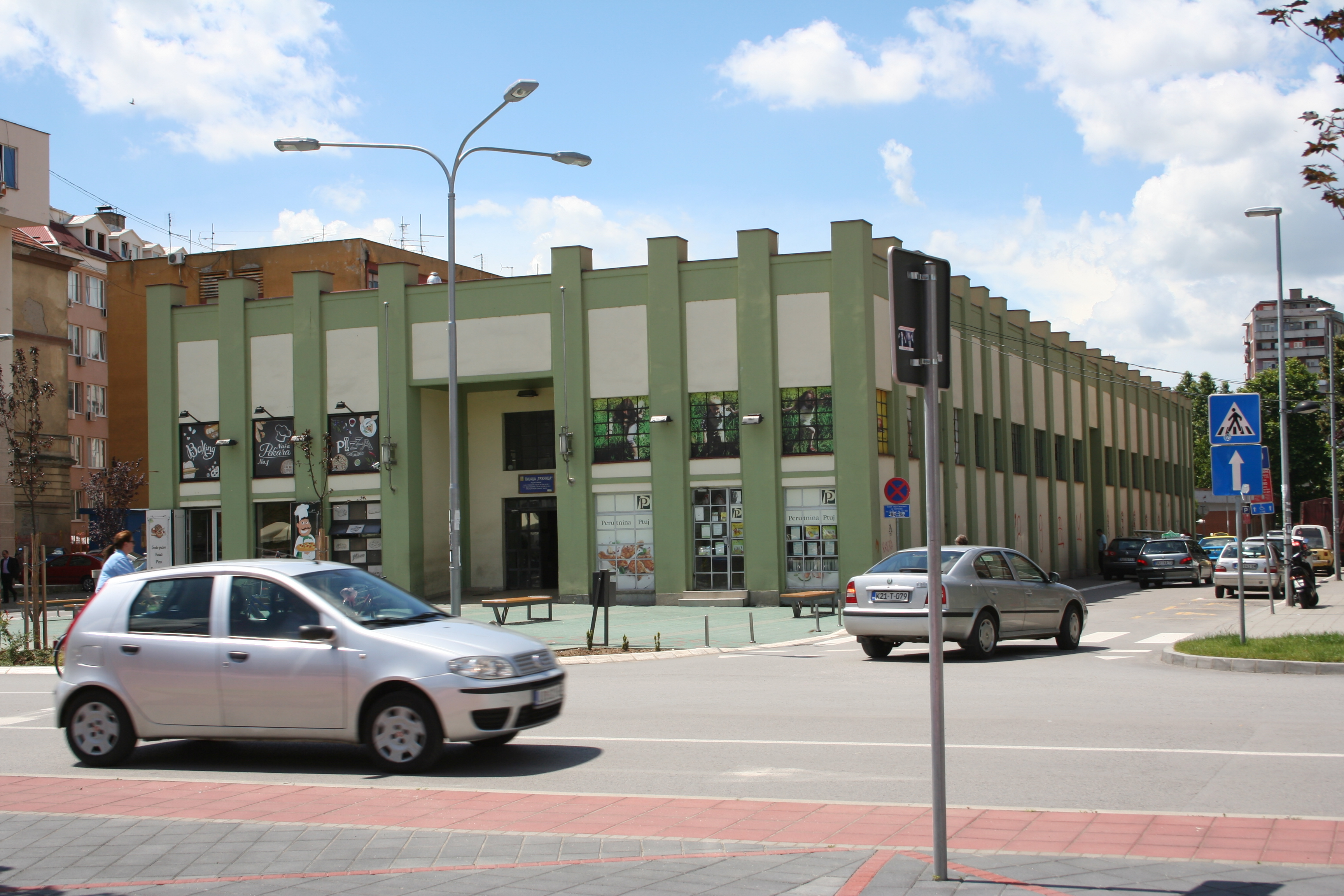 Gradska tržnica